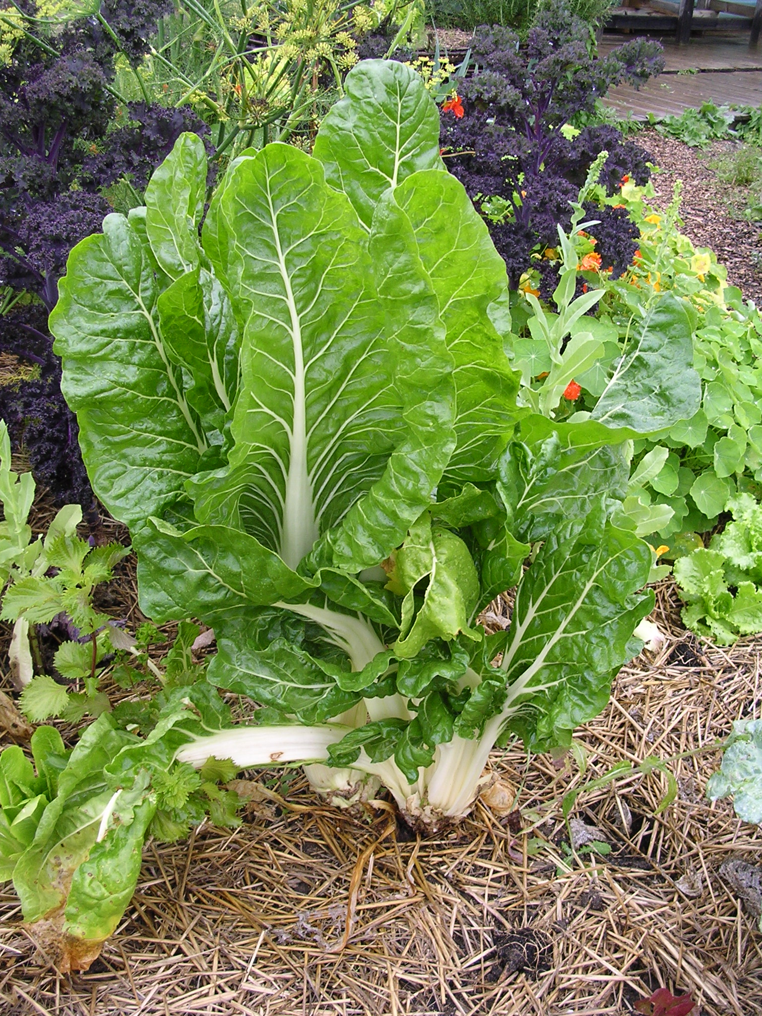 blette ou bette